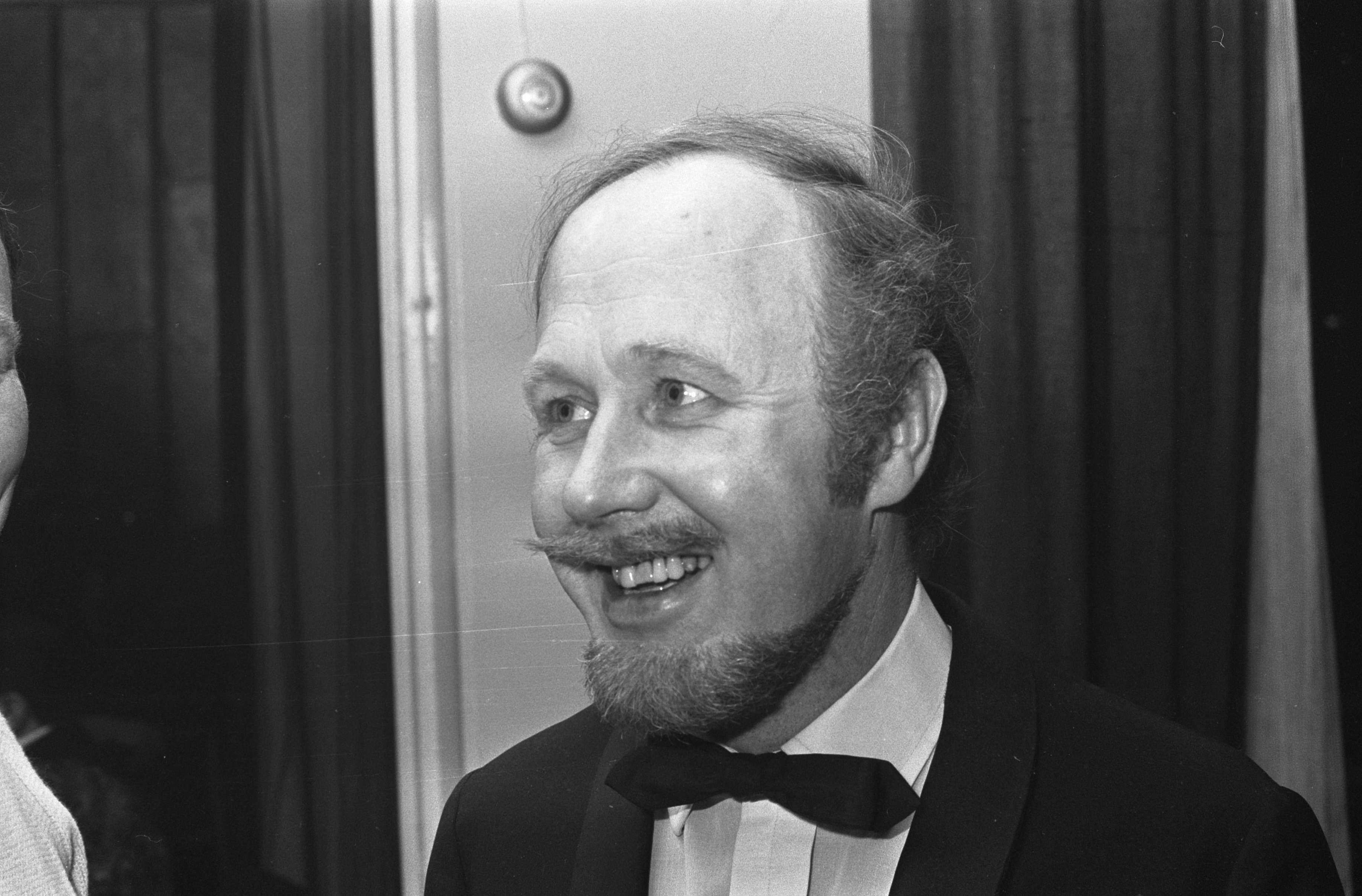 Collectie / Archief : Fotocollectie Anefo Reportage / Serie : Voorpremière van de film "Funny Girl" in bioscoop Du Midi te Amsterdam Beschrijving : Cabaretier Sieto Hoving Datum : 22 februari 1969 Locatie : Amsterdam, Noord-Holland Trefwoorden : cabaretiers, portretten Persoonsnaam : Hoving, Sieto Instellingsnaam : Du Midi Fotograaf : Fotograaf Onbekend / Anefo, [onbekend] Auteursrechthebbende : Nationaal Archief Materiaalsoort : Negatief (zwart/wit) Nummer archiefinventaris : bekijk toegang 2.24.01.05 Bestanddeelnummer : 922-1310